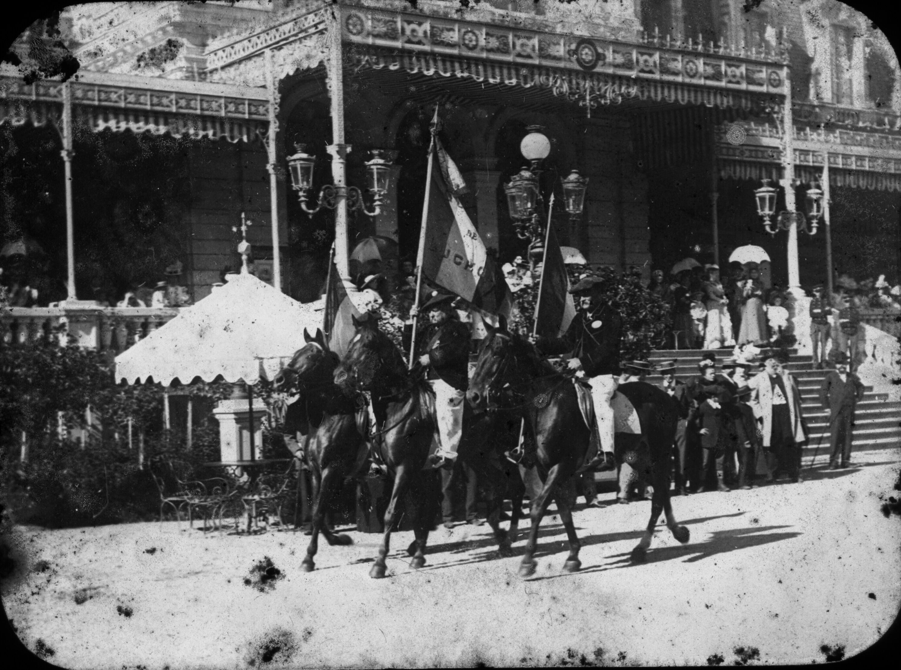 Fantasia des guides à cheval devant le casino, fête des Fleurs, septembre 1898, Luchon (Haute-Garonne, France). Fonds Trutat - Photographie ancienne Cote : TRU C 53 Localisation : Fonds ancien Original non communicable Titre : Fantasia des guides, porte-drapeau, devant le casino, septembre 1898 Auteur : Compayre, Marcel Rôle de l’auteur : Photographe Lieu de création : Bagnères-de-Luchon (Haute-Garonne) Date de création : 1898 Auteur : Eugène Trutat (1840–1910) DescriptionFrench photographer, naturalist and geologistDate of birth/death25 August 18406 August 1910Location of birth/deathVernon, EureFoix, AriègeAuthority control : Q960669 VIAF: 17277984 ISNI: 0000 0003 5411 9587 LCCN: no99011442 GND: 174281781 SUDOC: 027780252 WorldCat Rôle de l’auteur : Tireur Mesures : 9 x 10 cm Observations : Annotation : " D'après un cliché 4 1/2 x 6 de M. Compayre ". Mot(s)-clé(s) : -- Homme -- Costume masculin -- Béret -- Drapeau -- Cheval -- Equestre -- Casino -- Galerie -- Escalier -- Parasol -- Parc (public) -- Muret -- Balcon -- Défilé -- Spectateur -- Porte-drapeau -- Bagnères-de-Luchon (Haute-Garonne) -- Pique (France ; vallée) -- Pyrénées (France) -- 19e siècle, 4e quart -- 19e siècle, 2e moitié Médium : Photographies -- Noir et blanc -- Positifs au collodion sur plaque de verre -- Scènes de rue Bibliothèque de Toulouse. Domaine public